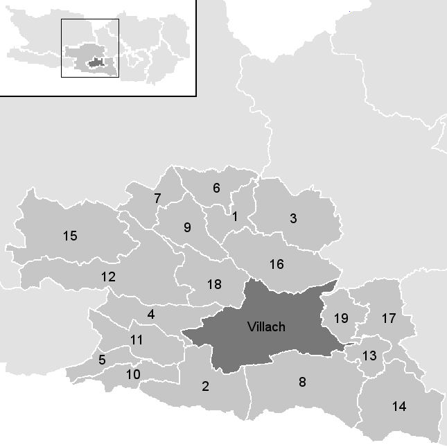 Leere Karte mit den Gemeinden im Österreichischen Bezirk Villach-Land